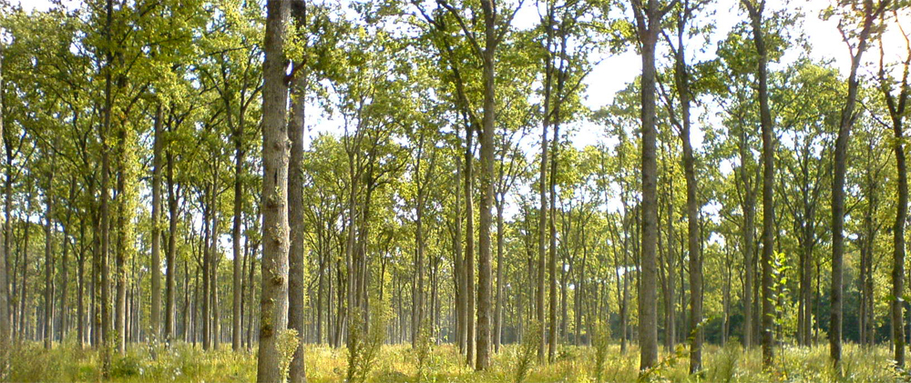 Rijetka šuma kod Koške